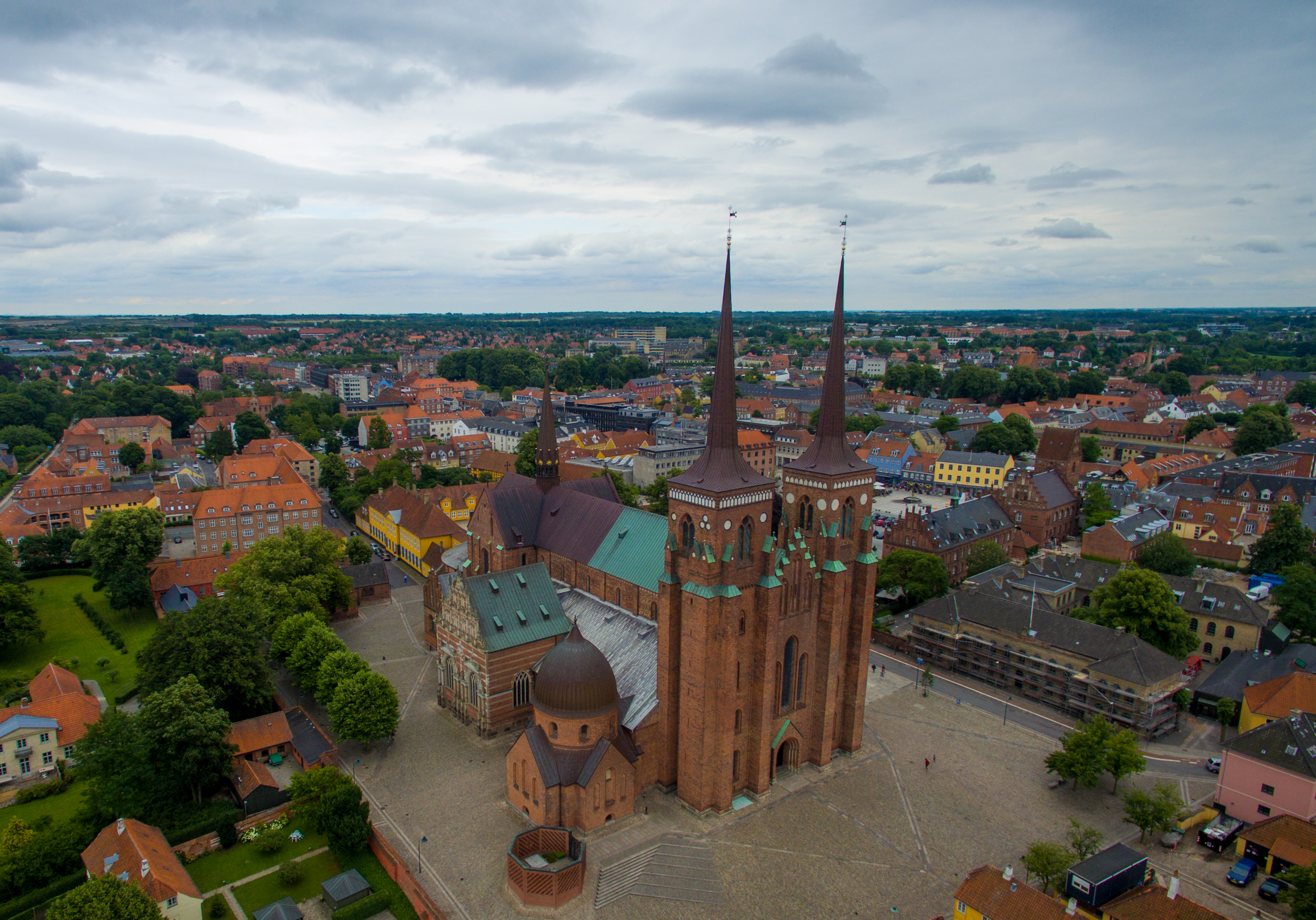 Roskilde Cathedral in Roskilde, Denmark